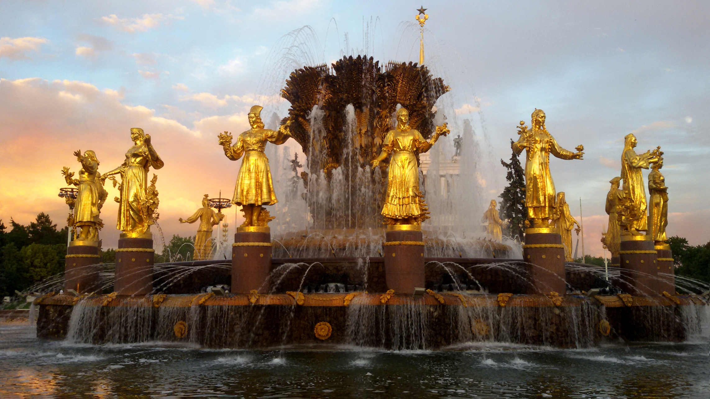 Фонтан Дружба народов: просп. Мира, на территории ВВЦ, Останкинский, Северо-Восточный округ, Москва